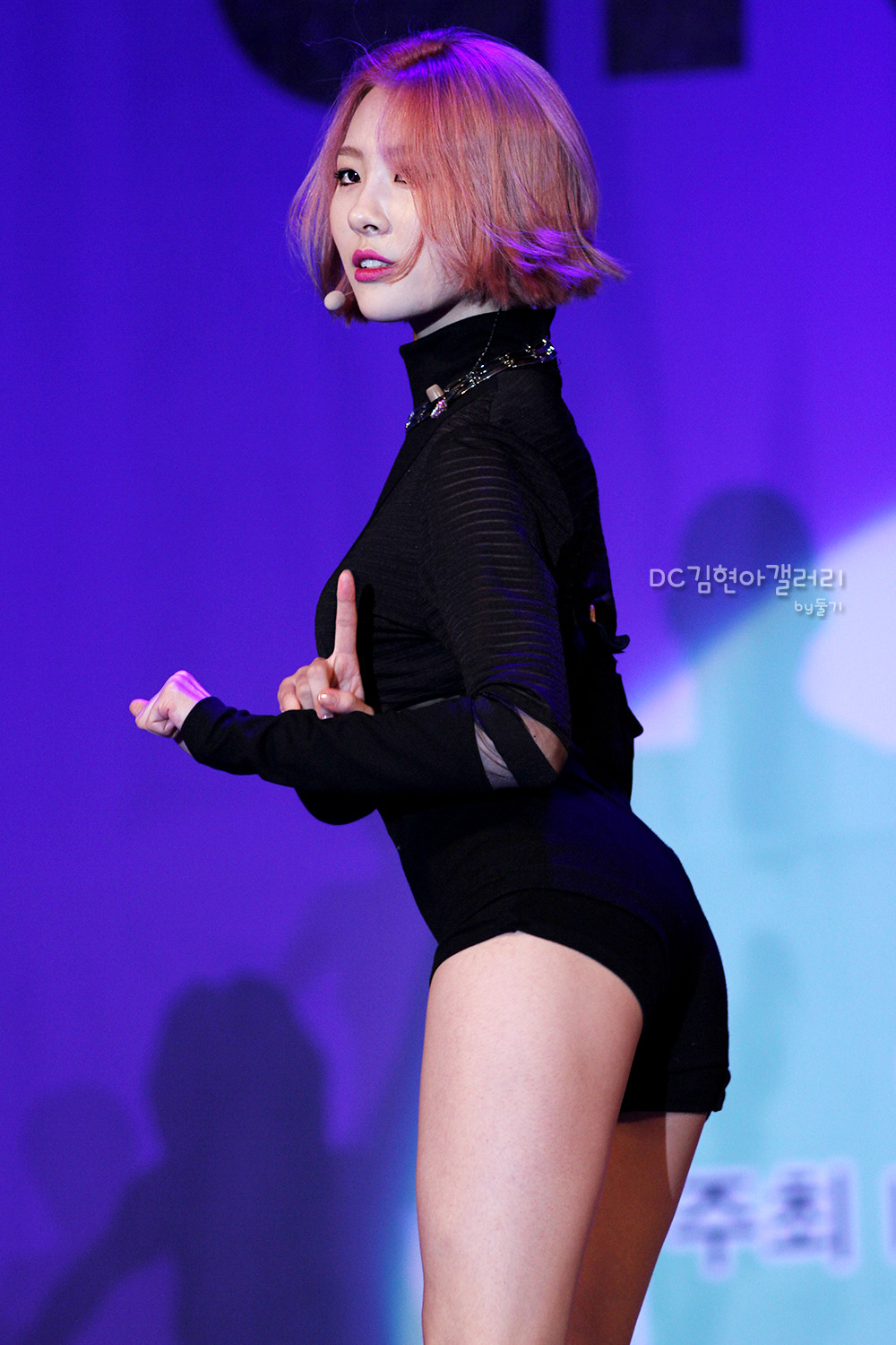 2013년 9월 29일 그린리본마라톤 희망콘서트 에서 선미.